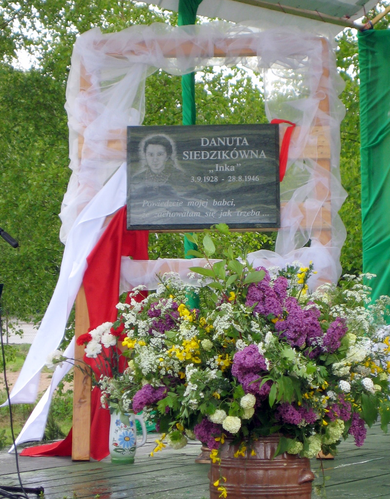 Tablica Pamiątkowa Danuty Siedzikówny Inki w Podjazach z okazji 100 lecia szkoły i nadania imienia patronki